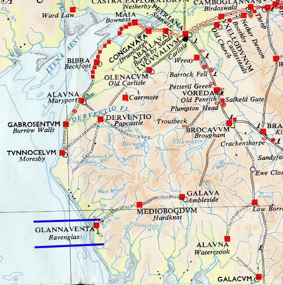 Muncaster. OS-RB